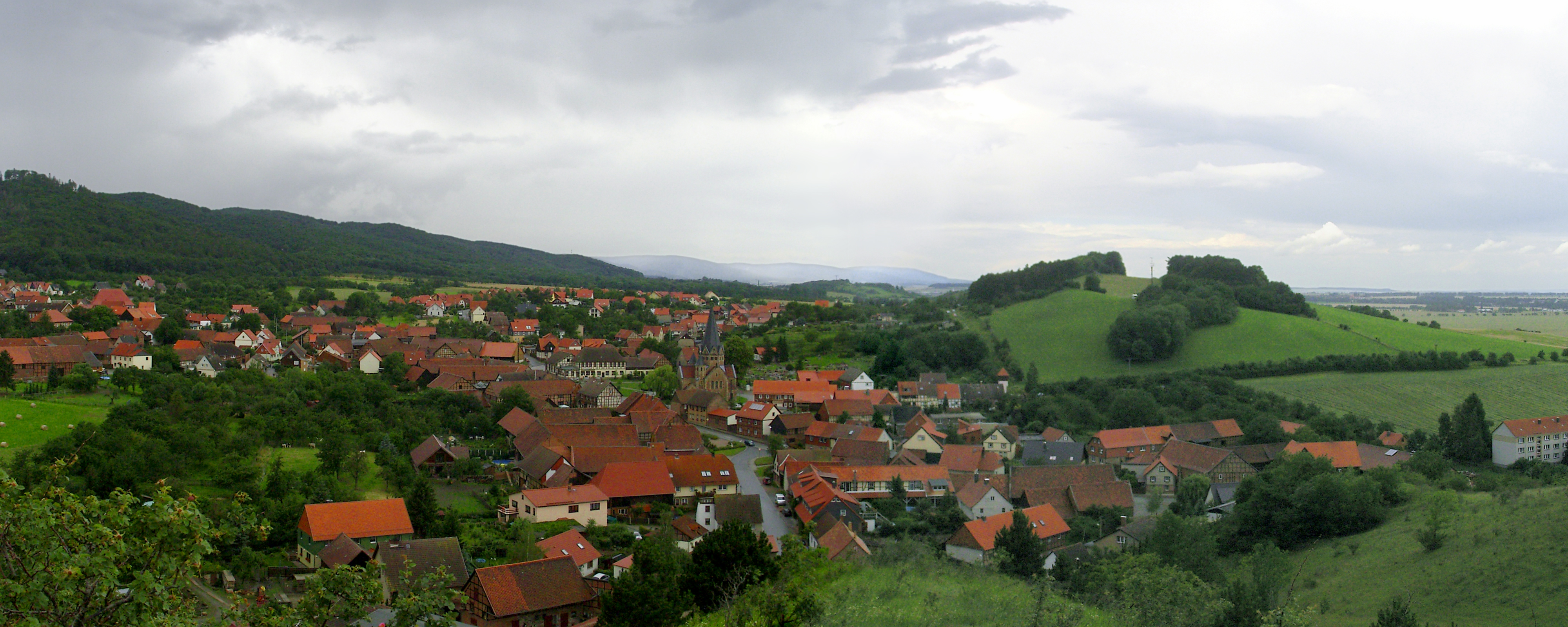 Beschreibung: Benzingerode, gesehen vom Struvenberg (siehe: Ziegenberg) Aufnahmedatum: 23. Juni 2007 Fotograf: ArtMechanic